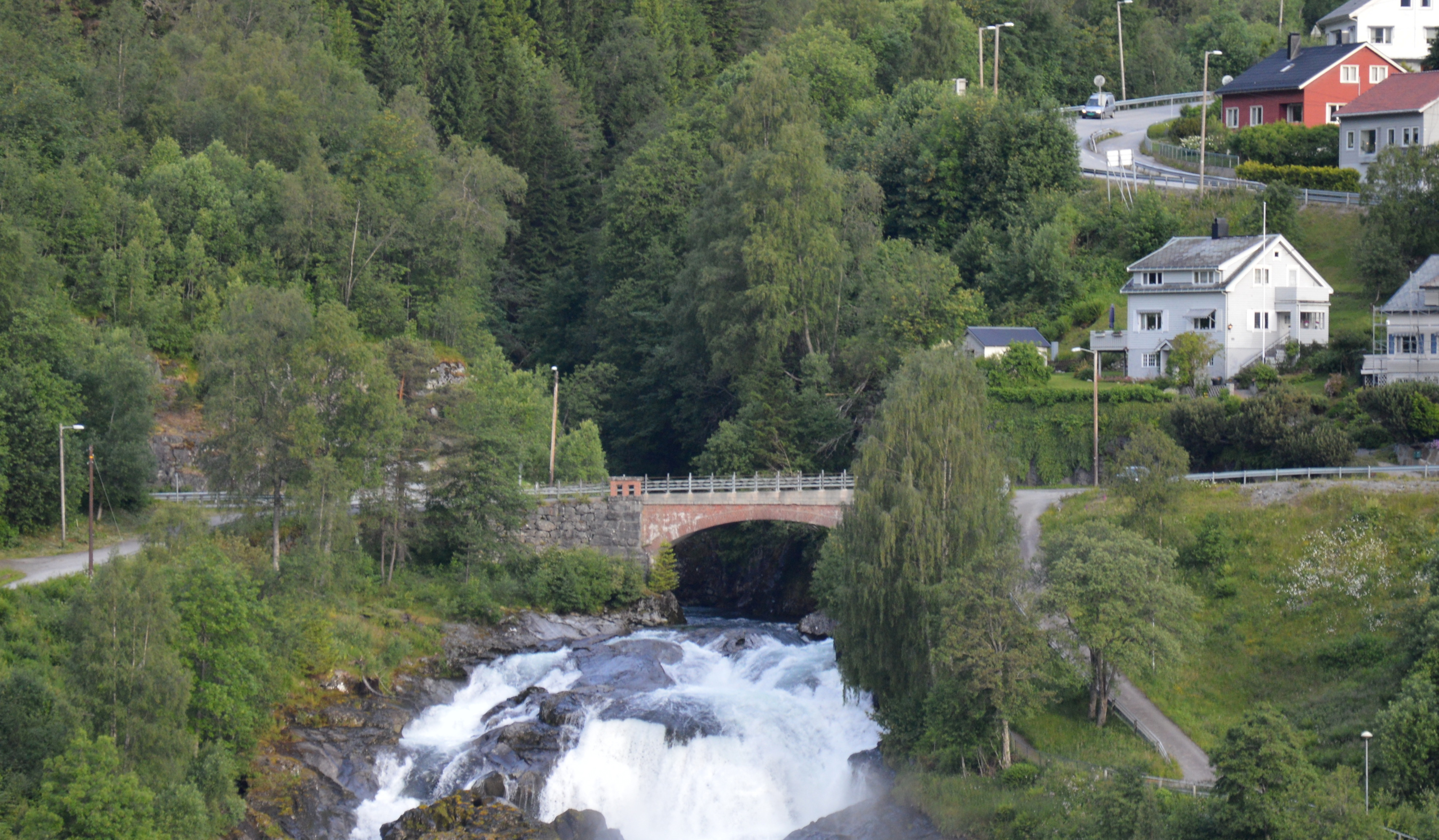 Obere Brücke Hellesylt